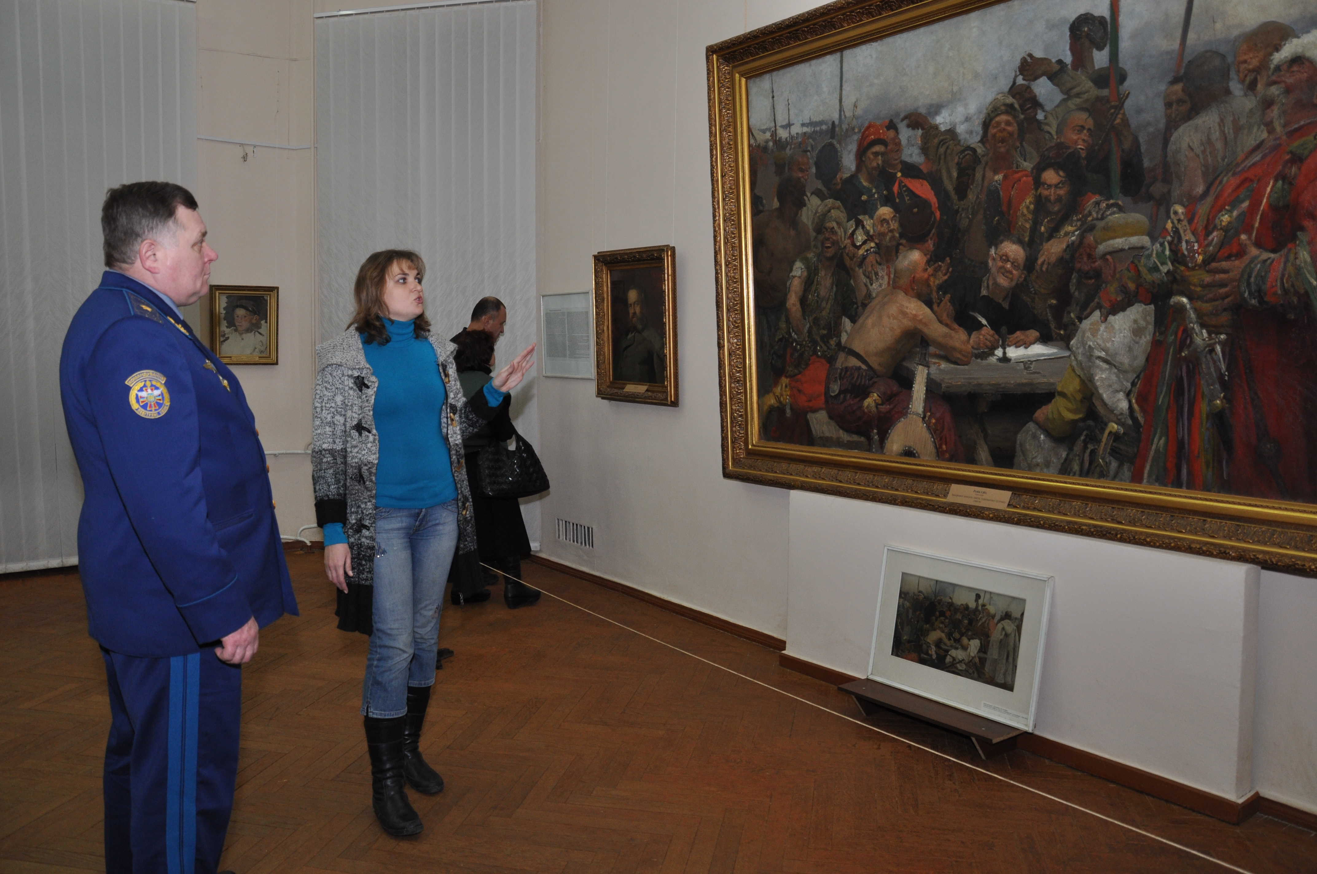 Kharkiv art museum Native nameUkrainian: Харківський художній музейLocationKharkiv, UkraineCoordinates50° 00′ 23″ N, 36° 14′ 59″ E Established1920WebsiteХарьковский художественный музей